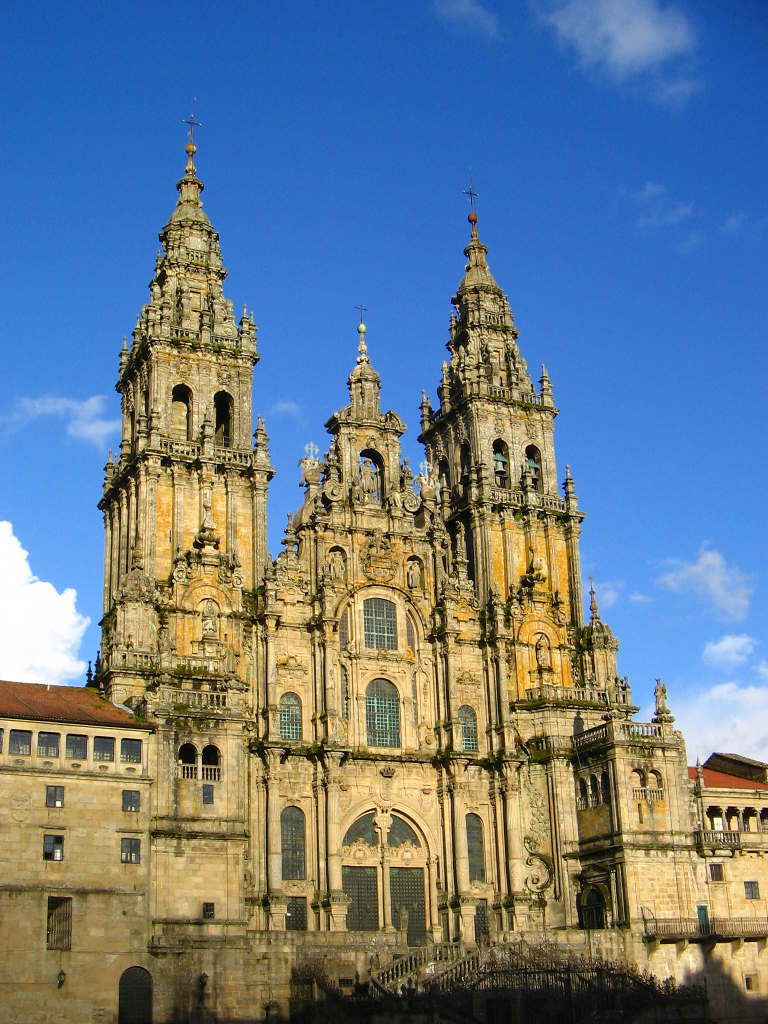 Vue sur la façade de la cathédrale de Saint-Jacques-de-Compostelles.